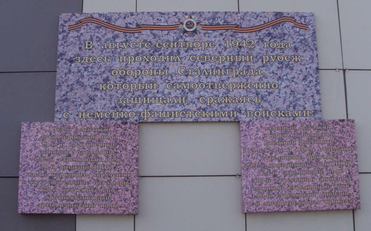 Памятная доска посвящённая событиям Сталинградской битвы: Бои на Орловском выступе.